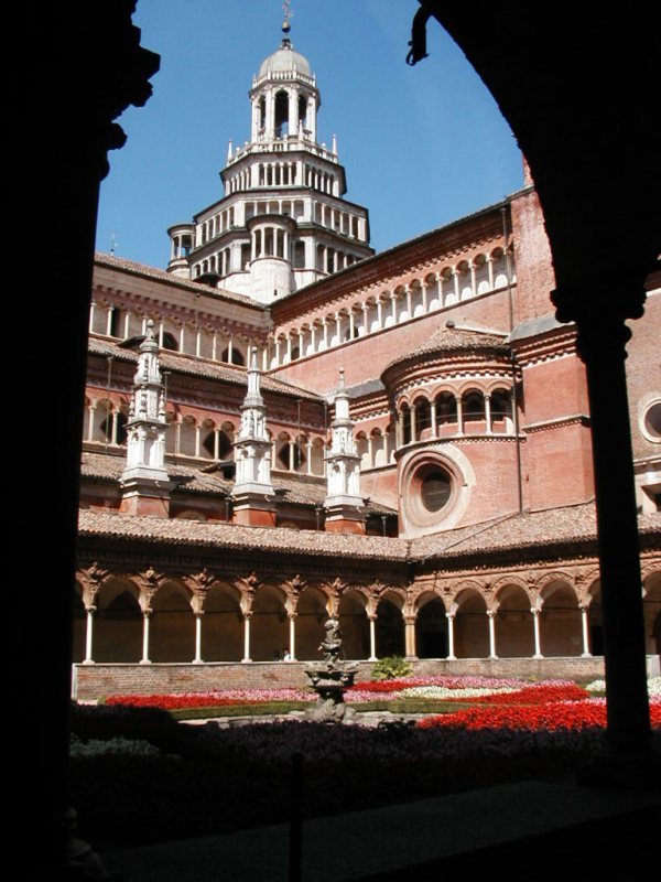 La Certosa vista dal Chiostro (Foto Luigino C.) Agosto 2004